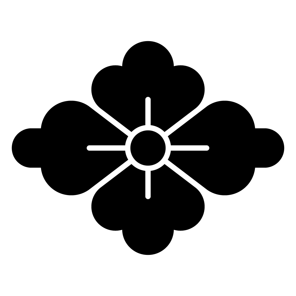 花菱紋の一種「花菱」。元は有職文様だが、甲斐武田氏の一門が家紋として用いたことで有名。